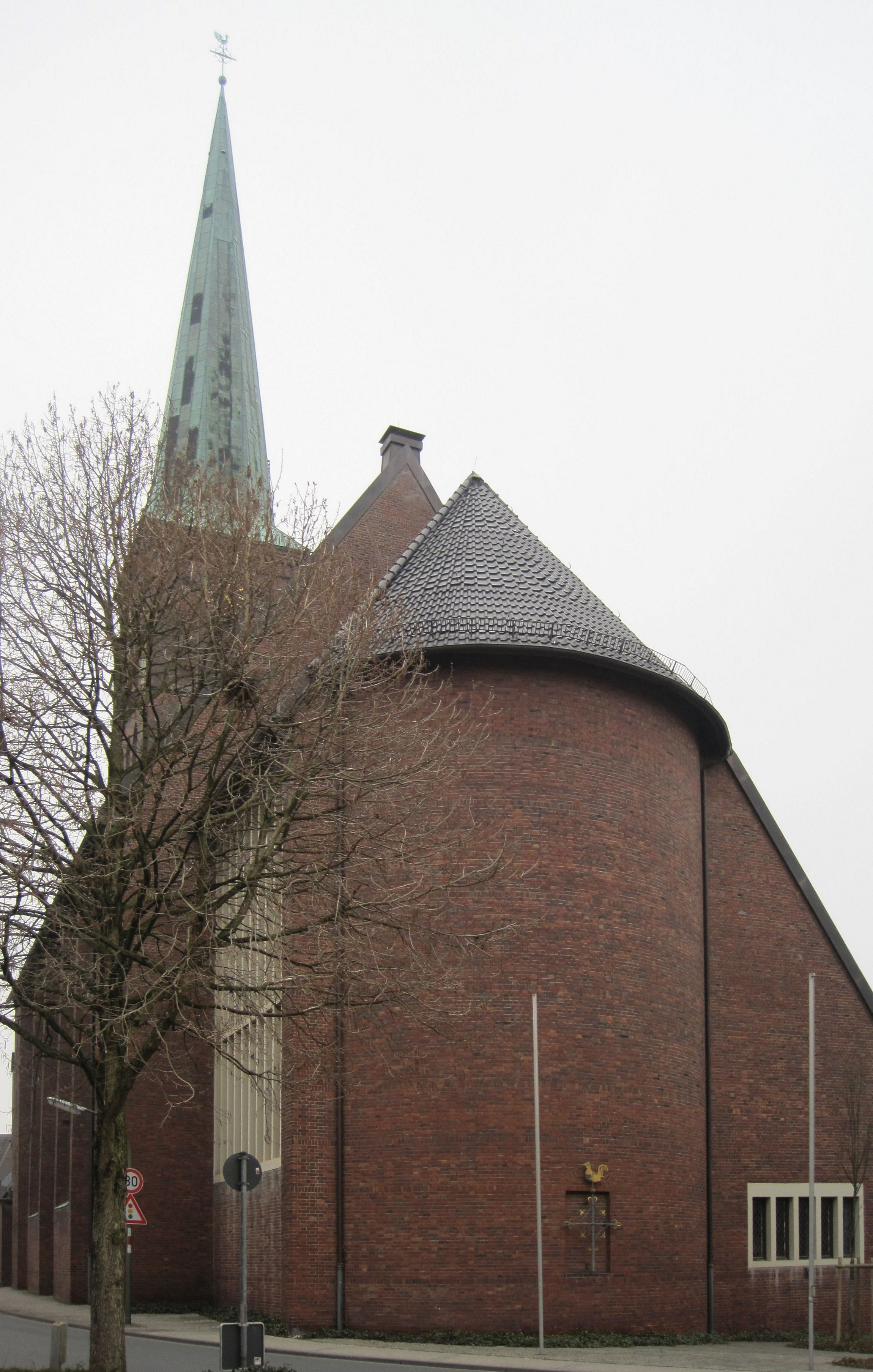 Das Foto zeigt die Pankratiuskirche in Hamm-Bockum-Hövel.